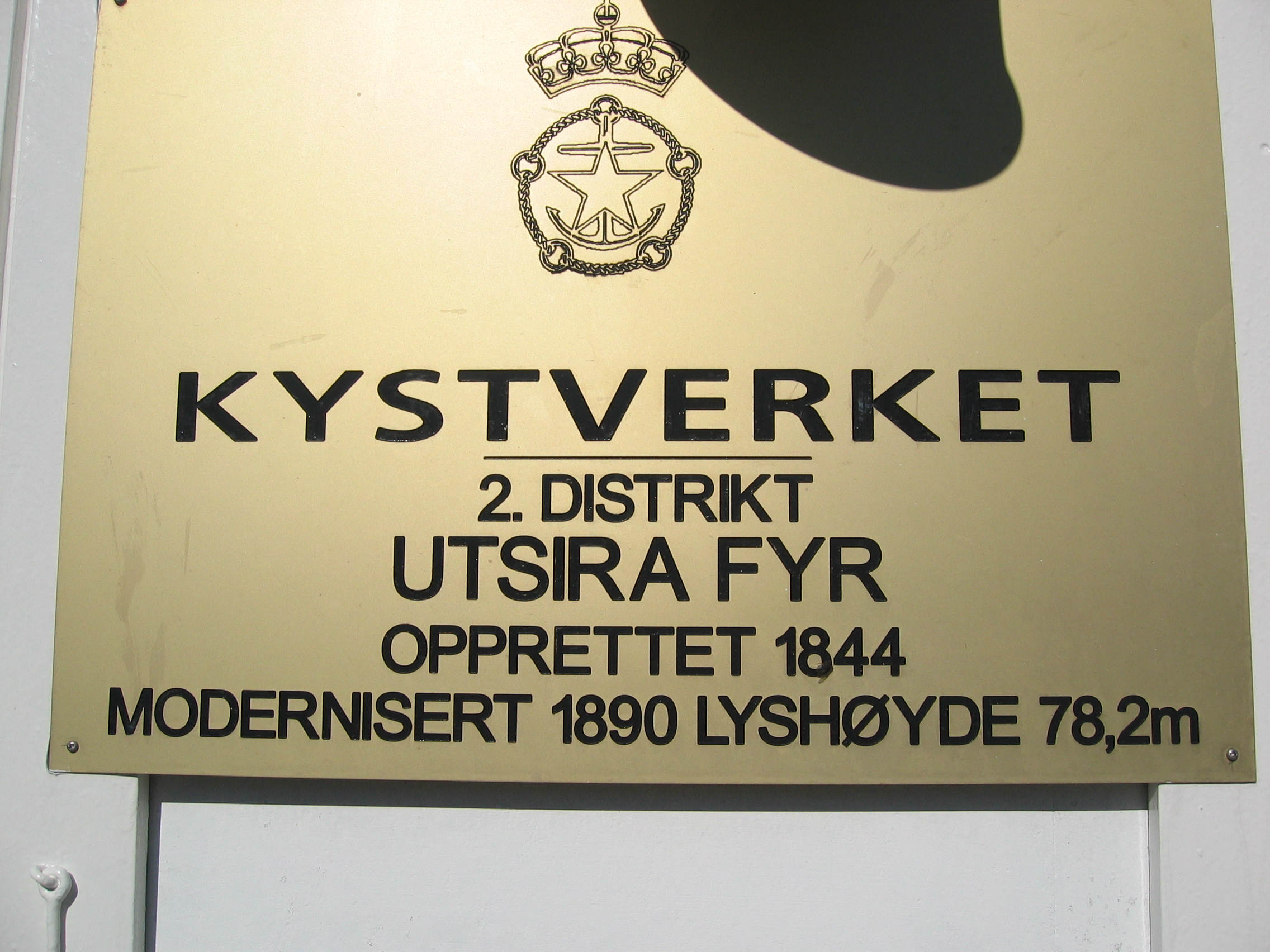 Utsira fyr - Kystverkets plate